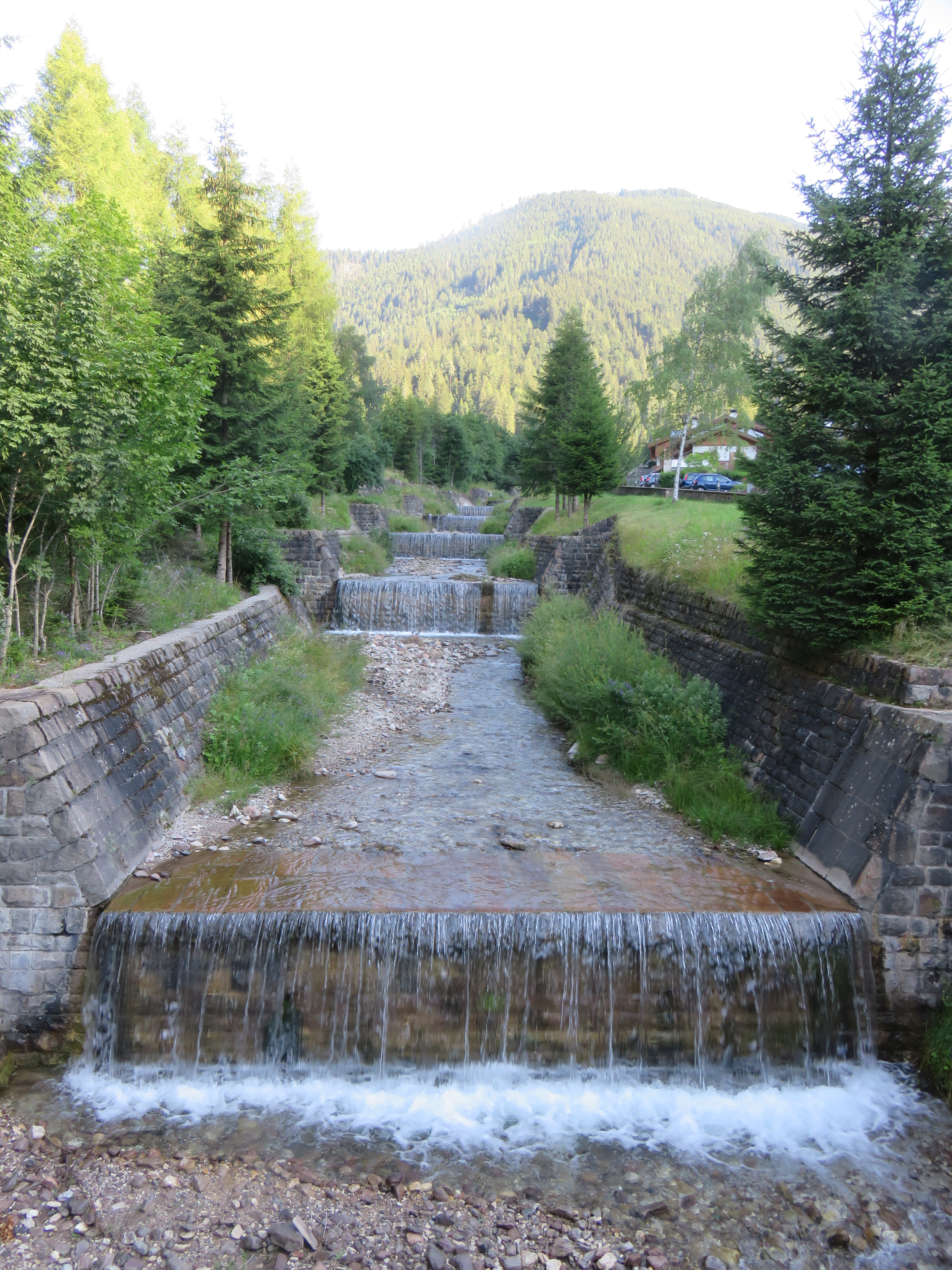 Rio Stava